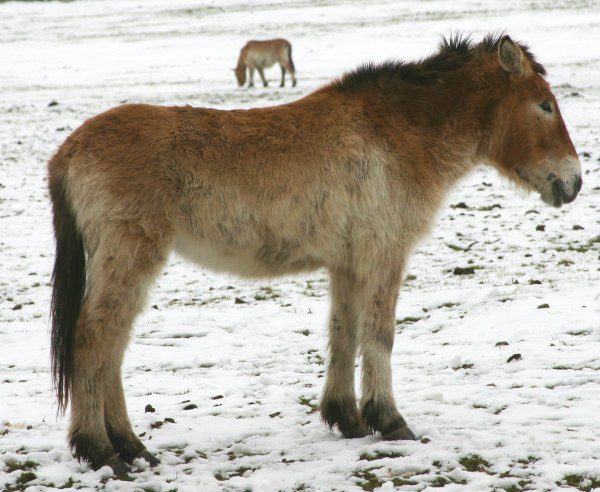 Przewalski-Pferd aus dem Tierpark Sababurg.